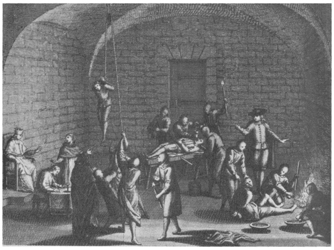 Inquisition torture chamber